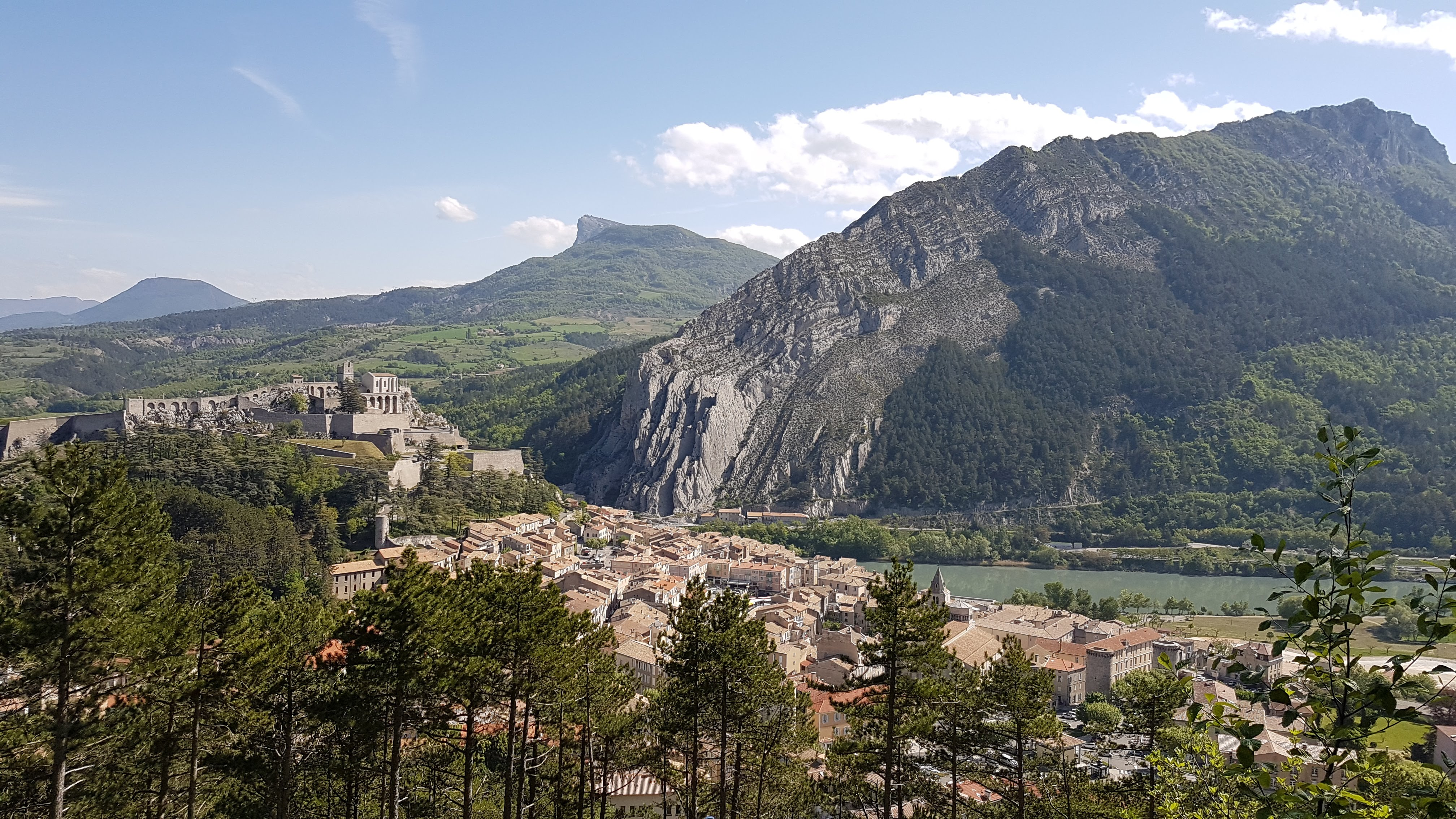 Panorama de la ville de Sisteron depuis le massif du Molard. A gauche la citadelle (XIVe - XVIe), au loin la Durance et la montagne de la Baume.